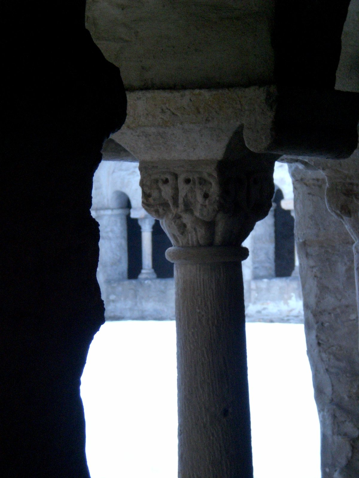 Claustro de la Busdorfkirche de Paderborn, Alemania